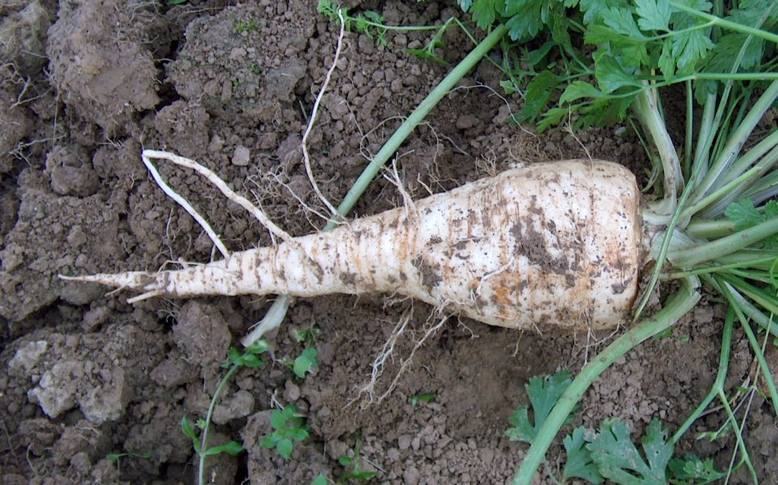 Wurzel der Wurzelpetersilie